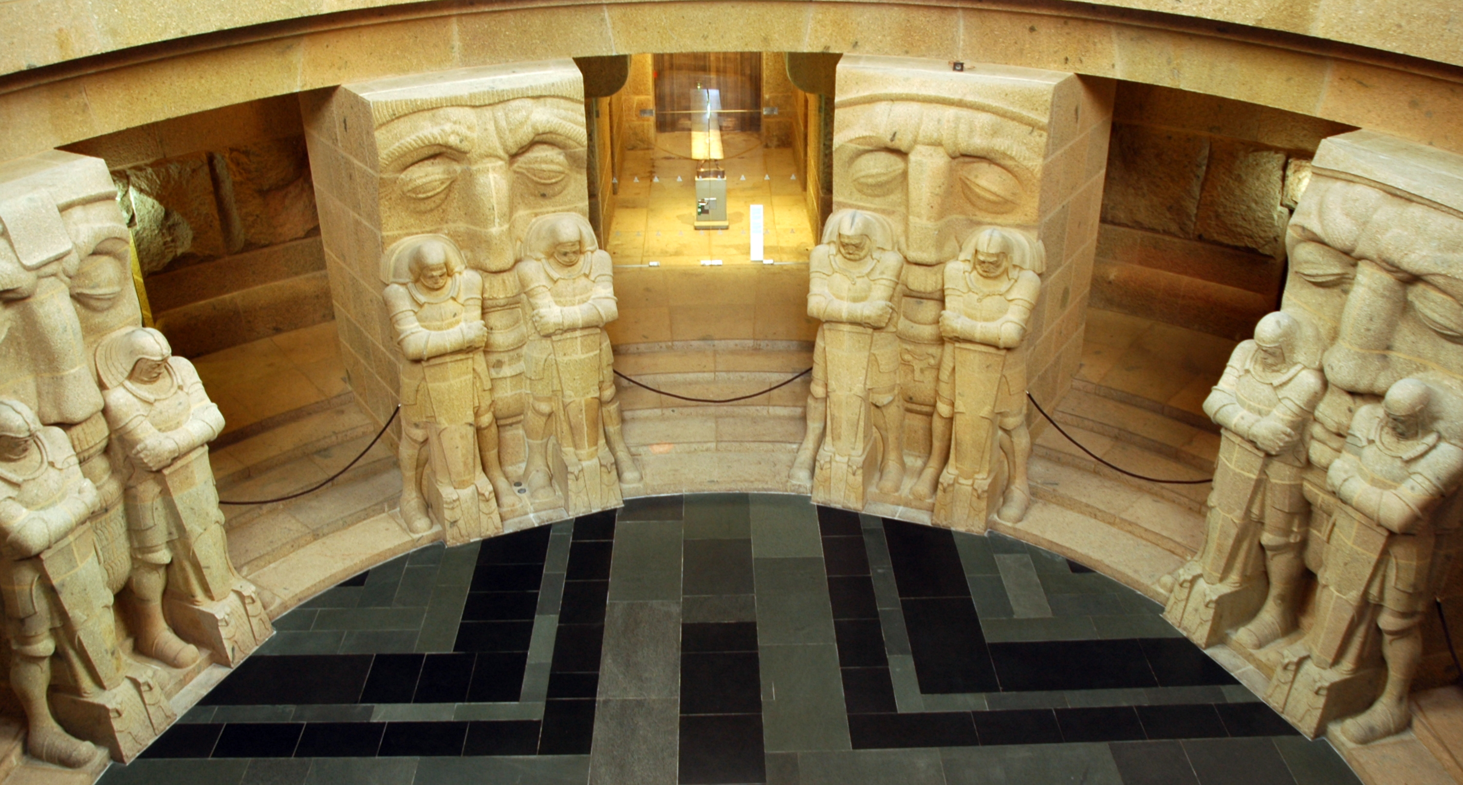 Leipzig